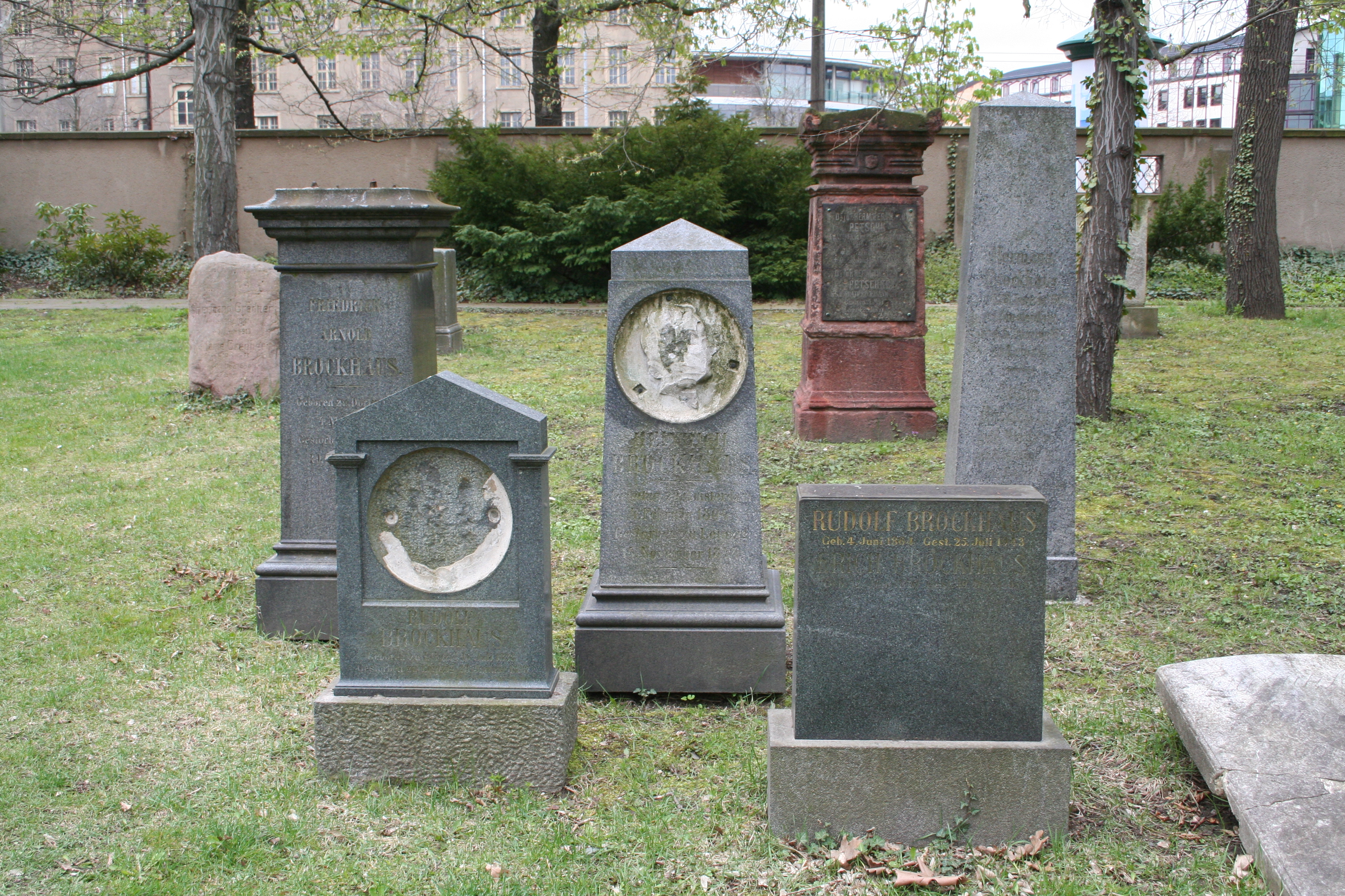 Grabsteine von Mitgliedern der Familie Brockhaus auf dem Alten Johannisfriedhof in Leipzig, die Steine standen ursprünglich auf dem Neuen Johannisfriedhof, heute Friedenspark